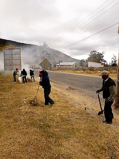 Limpiando calles mediante tequio, tradición cultural indígena, en Tejupan, Oaxaca, México.